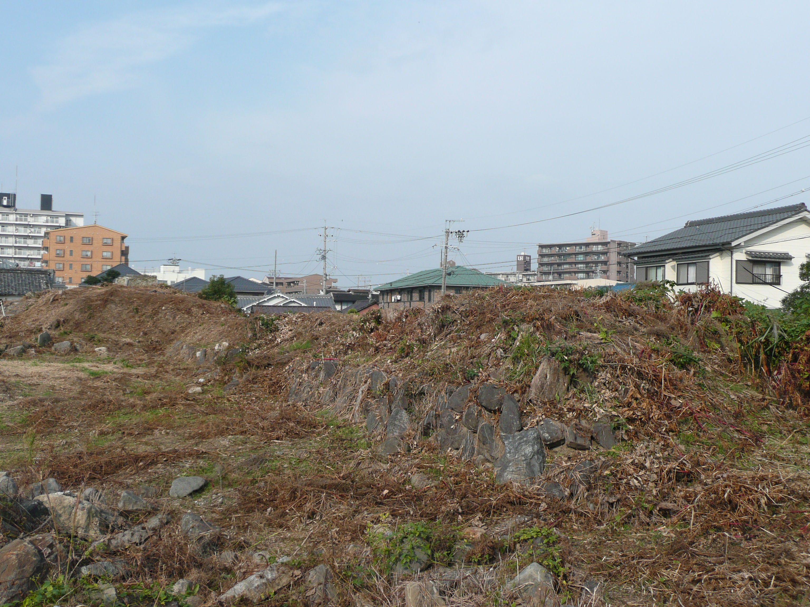 上条城全景。平城の土塁